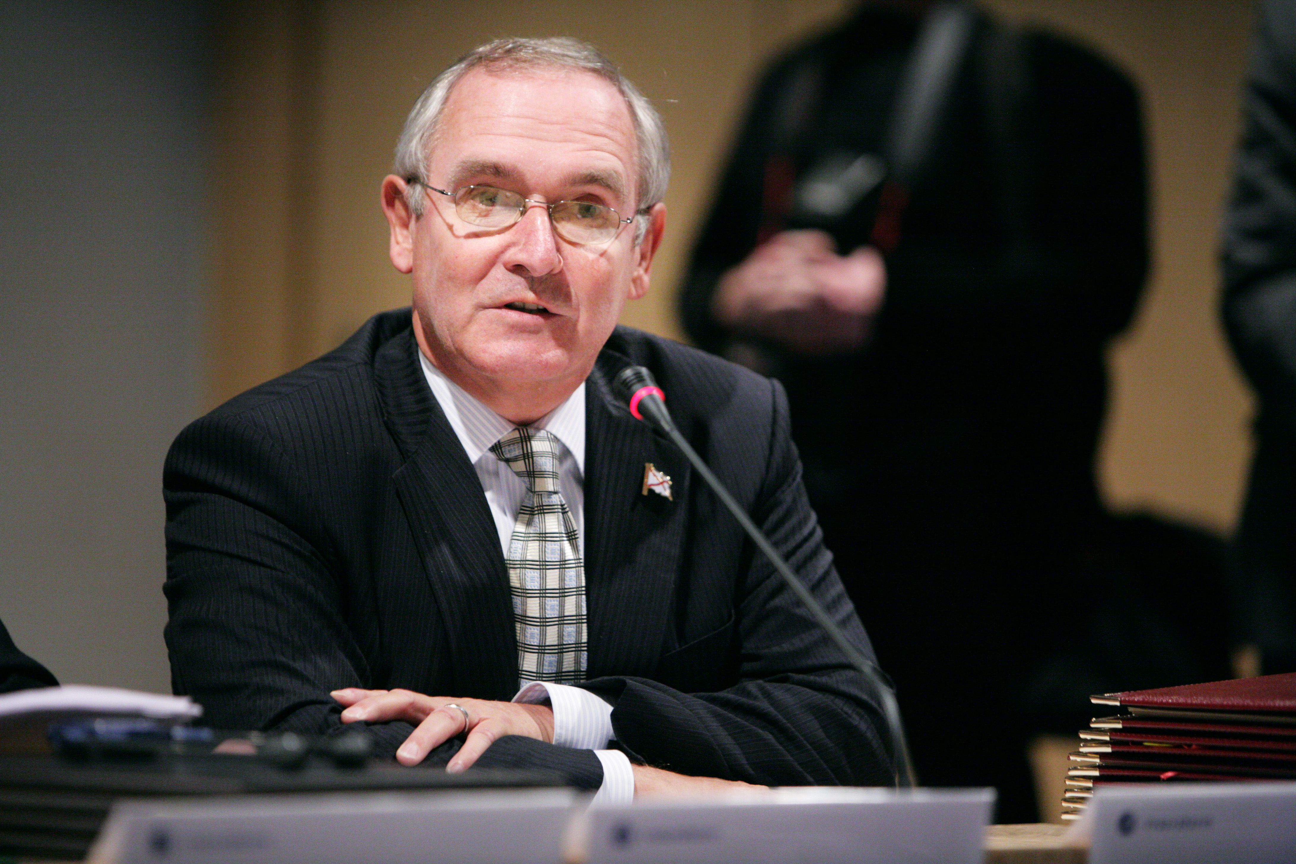 Jerseys finansminister Frank Walter vid Nordiska rådets session i Helsingfors 2008-10-28.